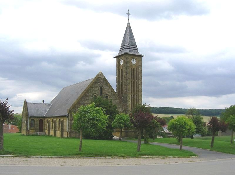 Bild aufgehellt